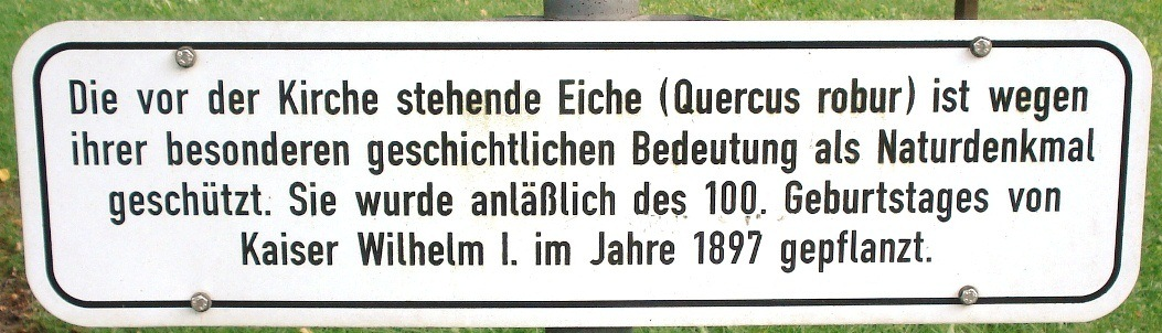 Ratekau_-_Wilhelmseiche_-_Schild